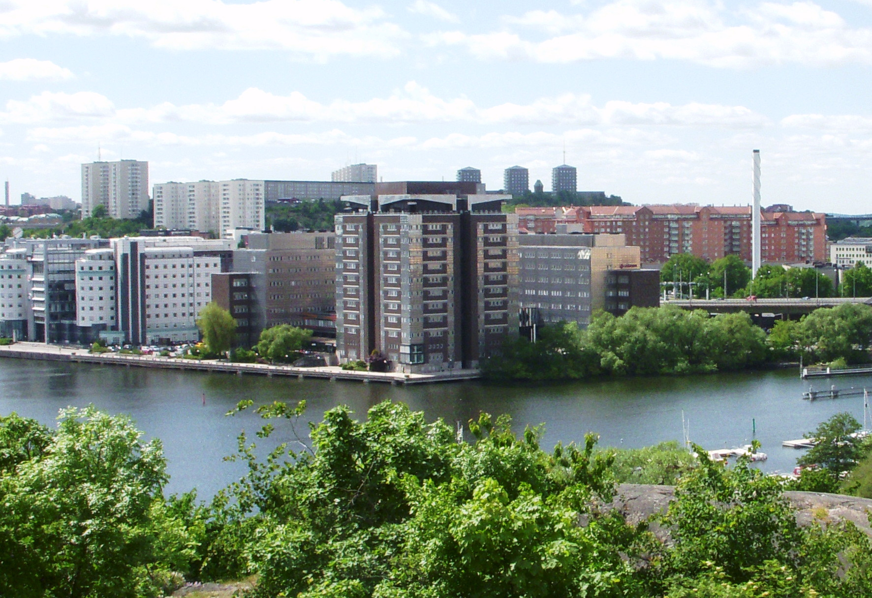 Kontorsfastigheten Marievik 15 från Tanto